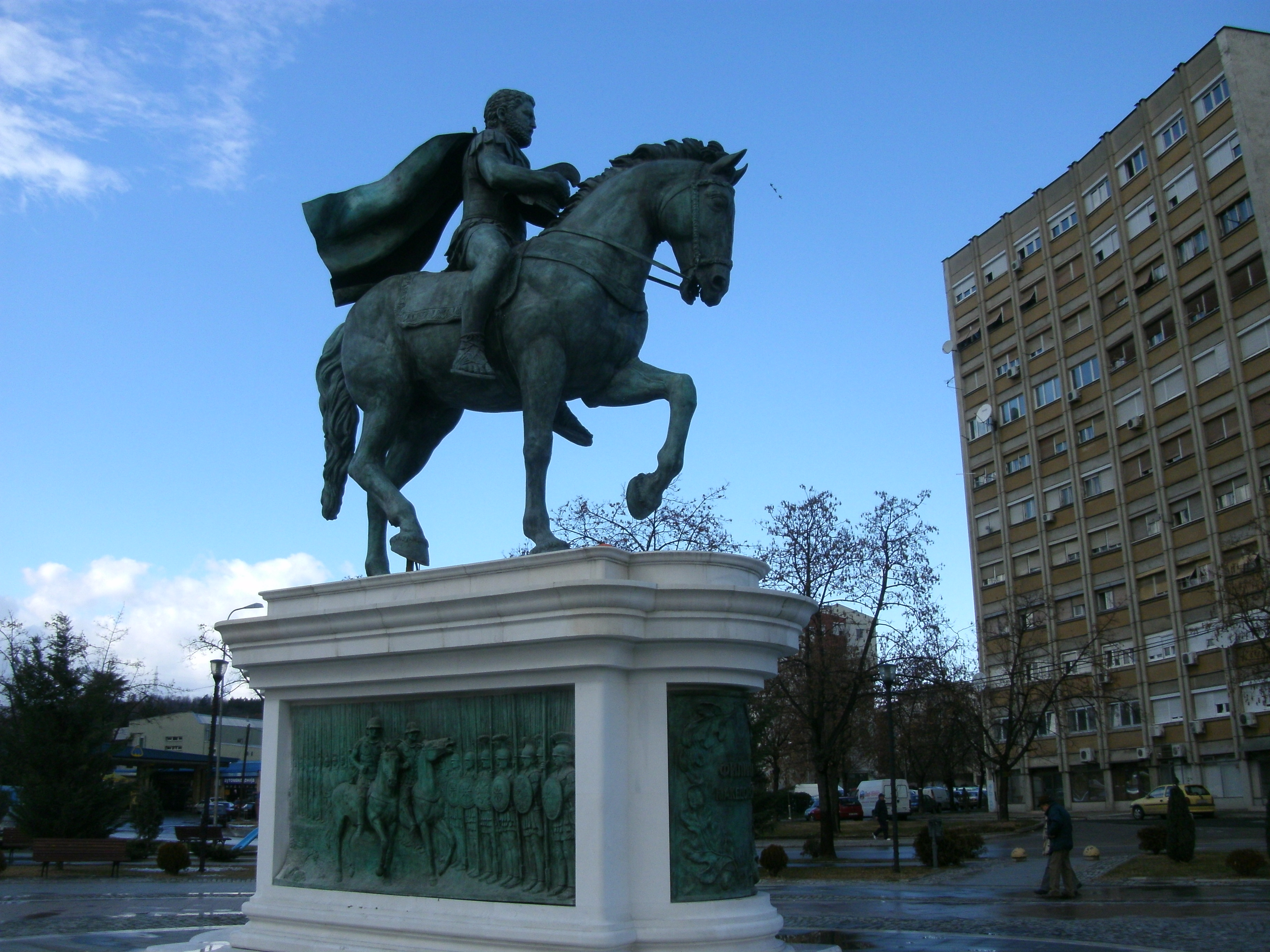 Споменик на Филип (Скопје - Автокоманда)